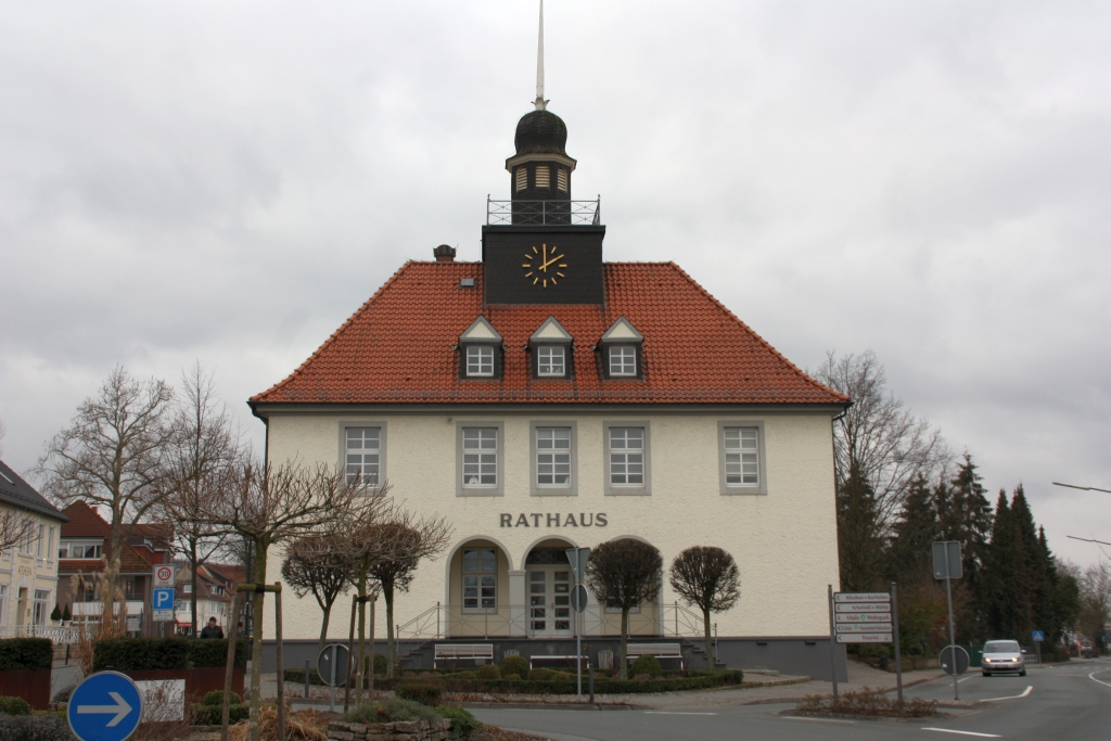 Rathaus Bad Essen